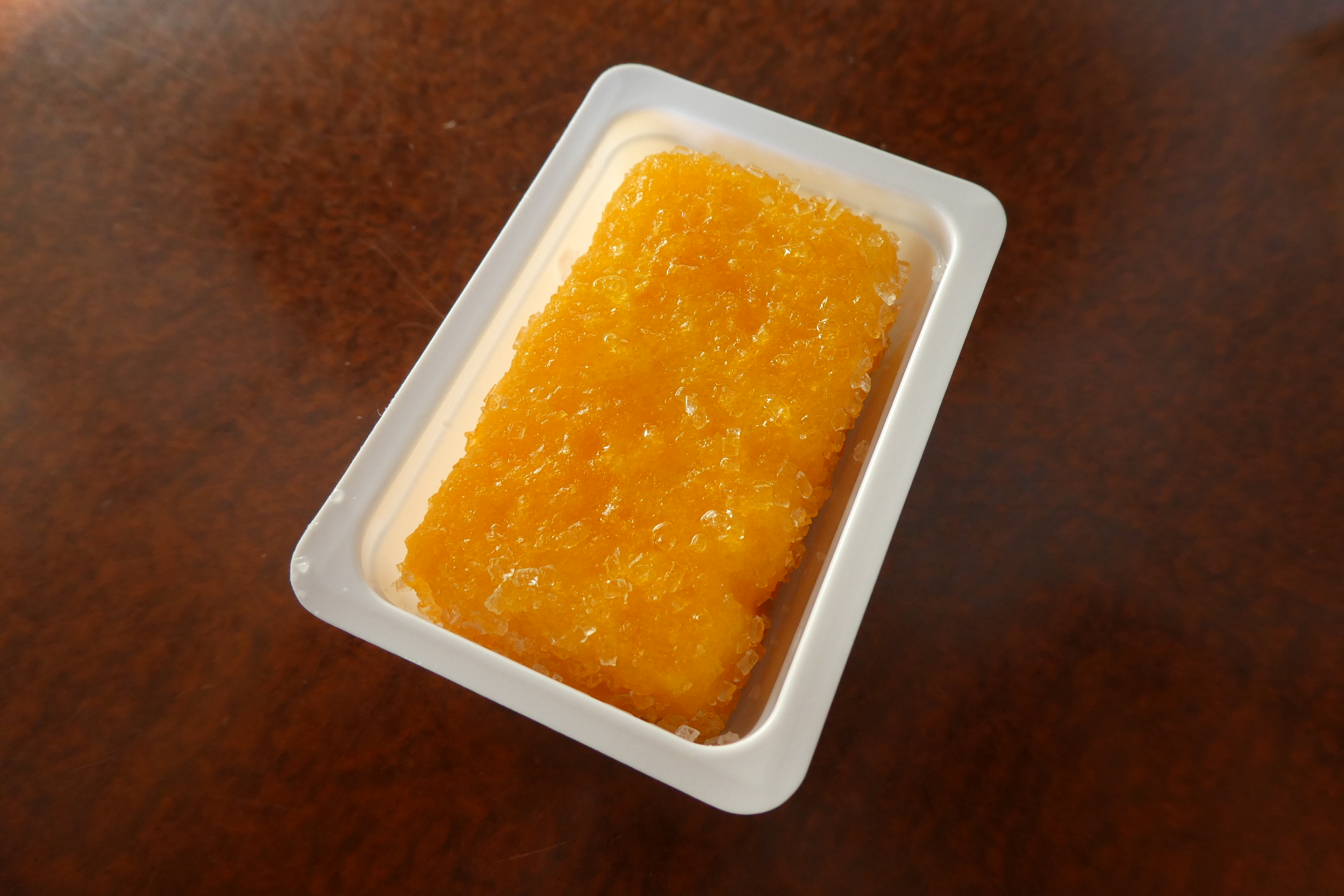 つたや總本家（平戸蔦屋）のカスドース